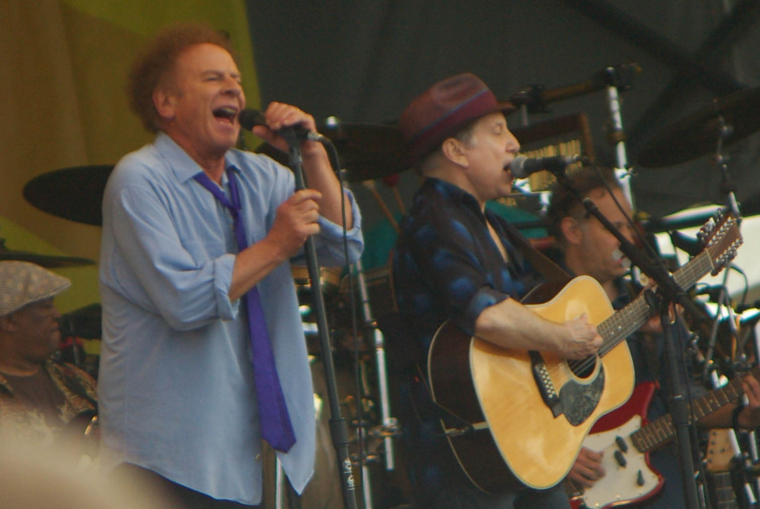 Simon & Garfunkel, Jazz Fest 2010